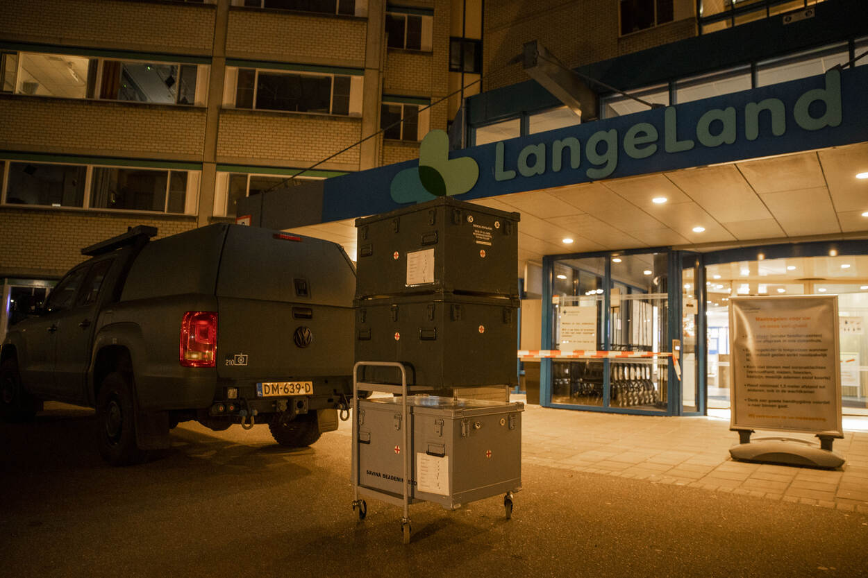 Zoetermeer, 29 Maart 2020. DMilitairen brengen beademingsapparatuur naar diverse ziekenhuizen in Nederland als gevolg van de Corona crisis. Er zijn afgelopen nacht 25 van deze machines afgeleverd bij diverse ziekenhuizen. Het Langeland ziekenhuis in Zoetermeer ontvingen er drie. foto: afleveren van het materiaal.